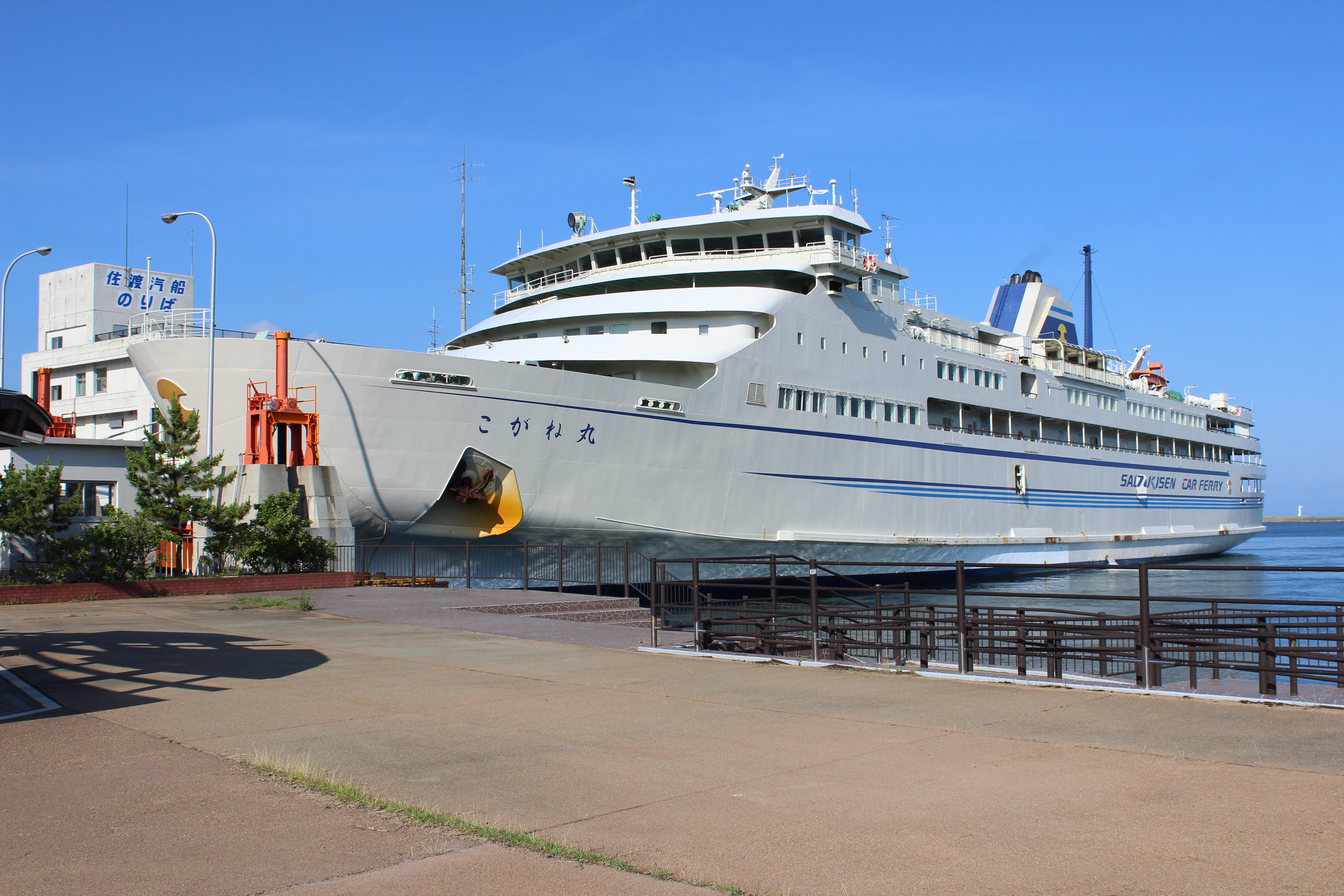 小木港に停泊中の佐渡汽船カーフェリー「こがね丸（3代目）」。